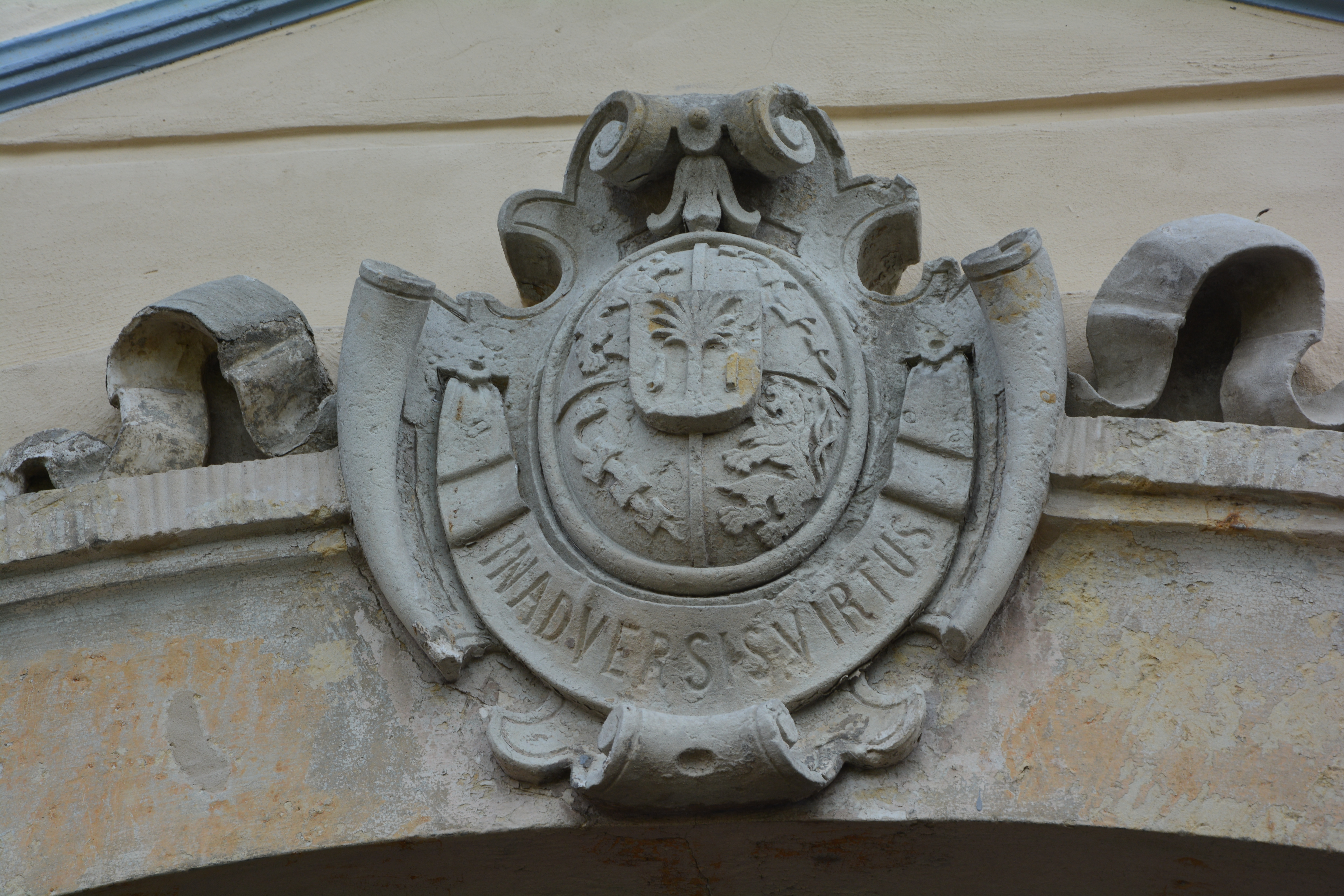 Schloss Lauterbach im Landkreis Meißen, Mai 2017, Wappen über dem Haupteingang vom Rittergut